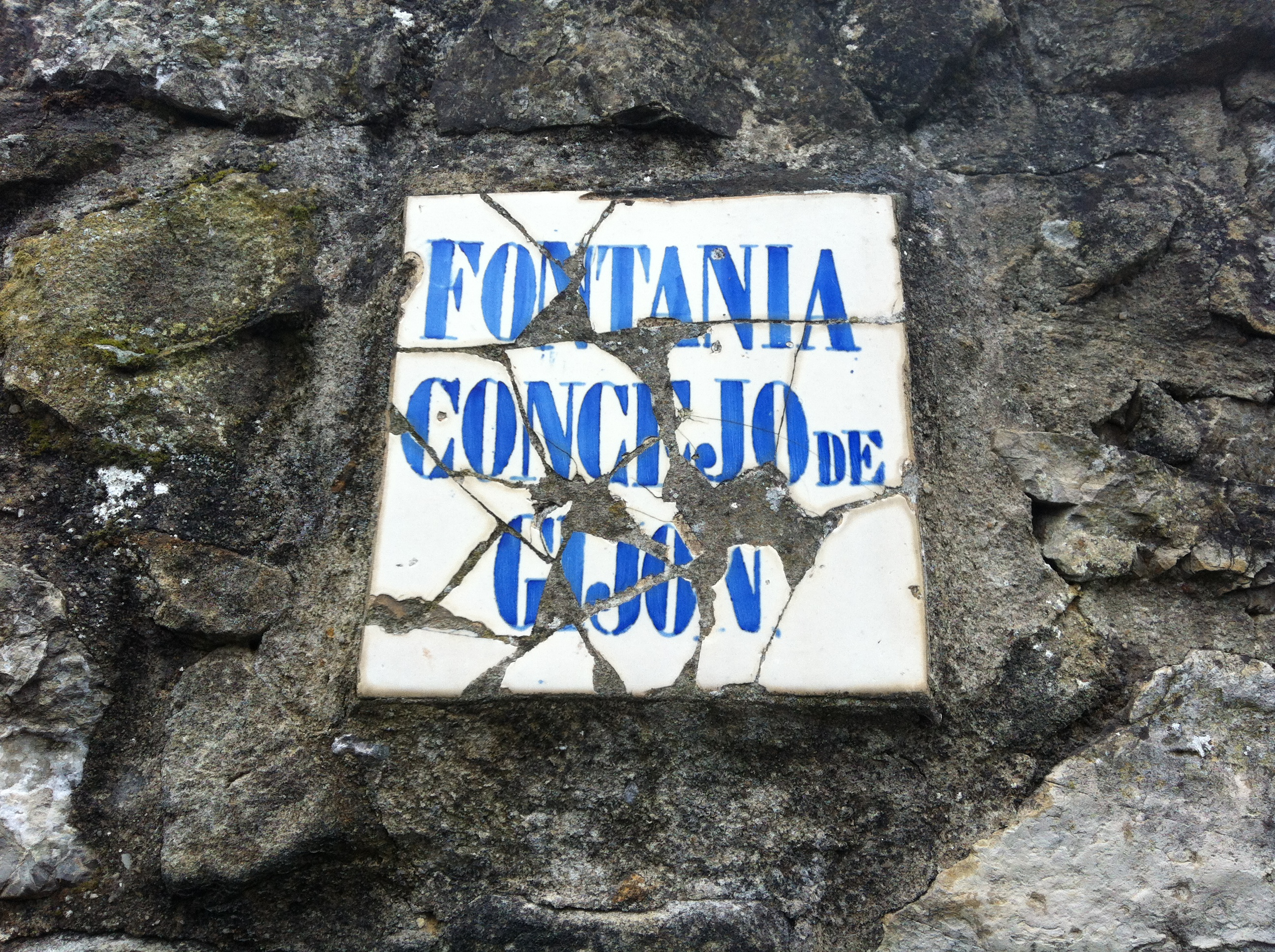 Placa antigua indicando el comienzo del barrio de Fontanía viniendo del barrio de El Pisón, en el camino del cañaveral. Somió (Gijón). España